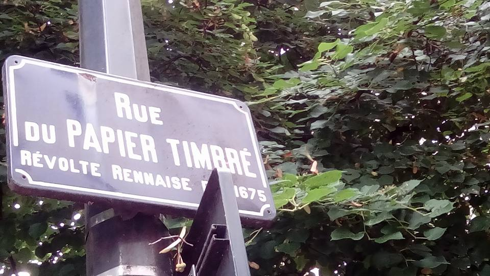 Plaque de la Rue du Papier Timbré, Rennes